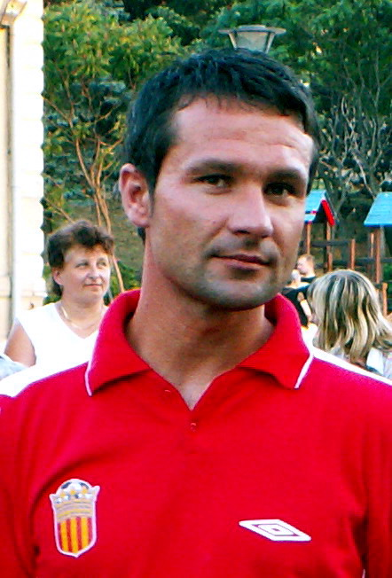 Sławomir Rutka - Korona Kielce player